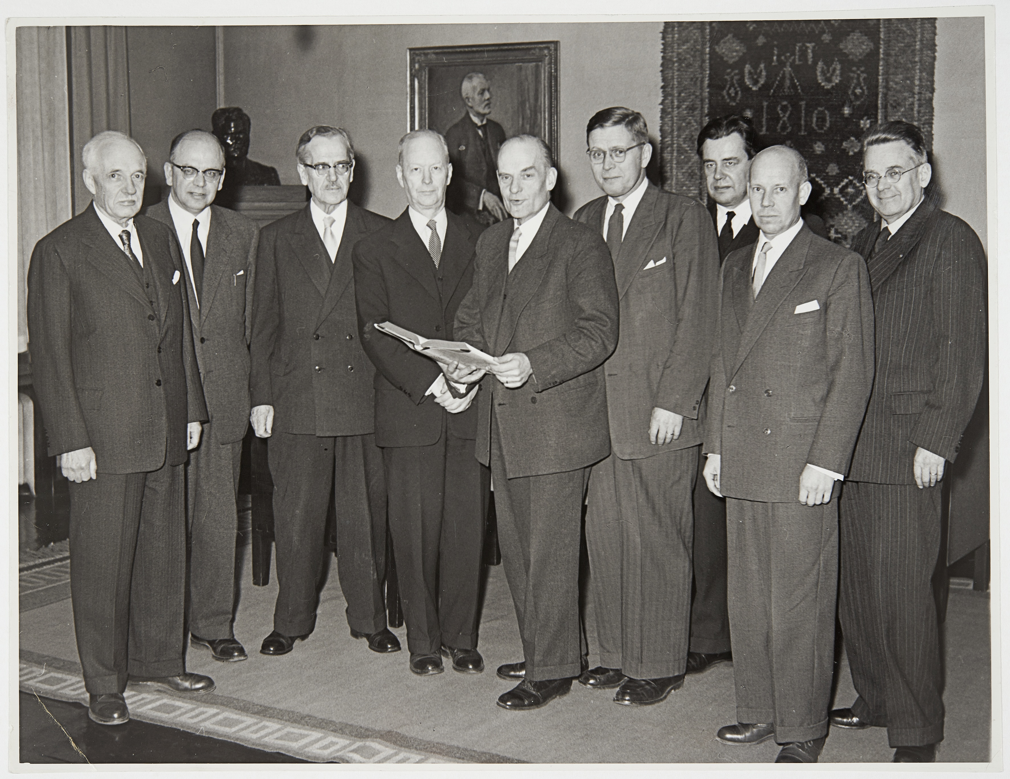 Ison Tietosanakirjan täydennysosien toimituskunta. Vasemmalta Hjalmar Brotherus, Reino Oittinen, Niilo J. Toivonen, Rafael Koskimies, L. Arvi P. Poijärvi, Heikki Waris, Matti Koskenniemi, Jaakko Wuolijoki ja Ilmari Havu.